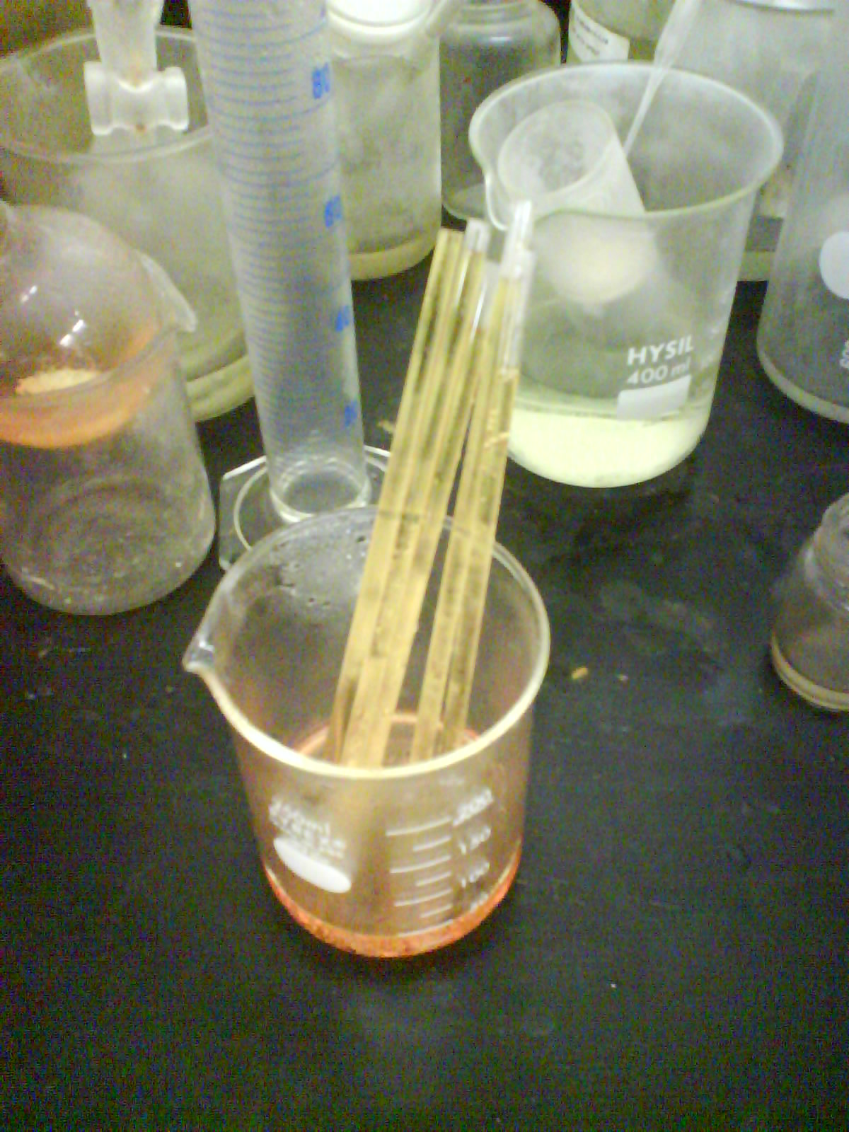 Agua regia utilizada para limpiar tubos de RMN Aqua regia used to clean NMR tubes